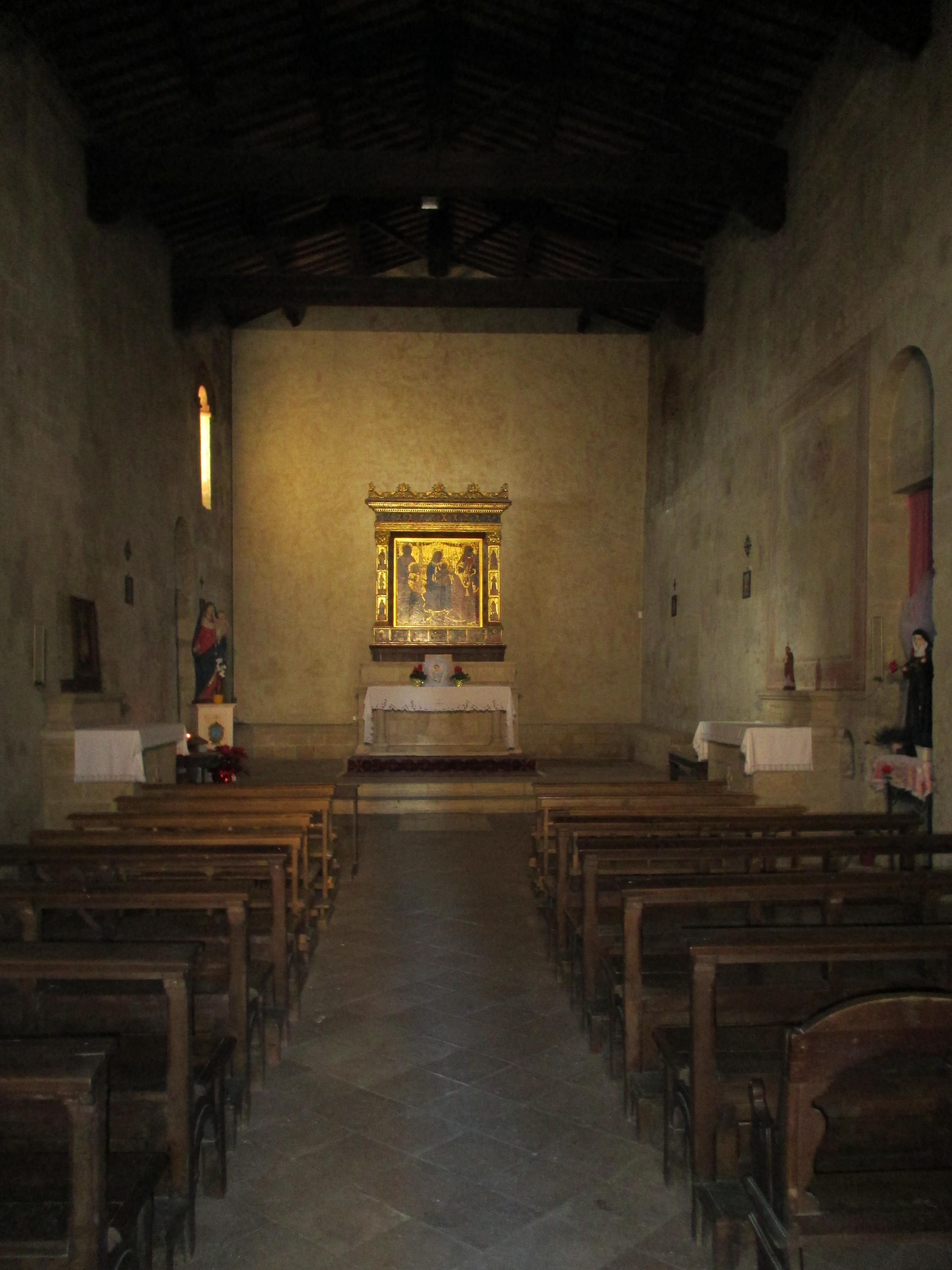 Colle Val d'Elsa, chiesa di Santa Maria in Canonica.